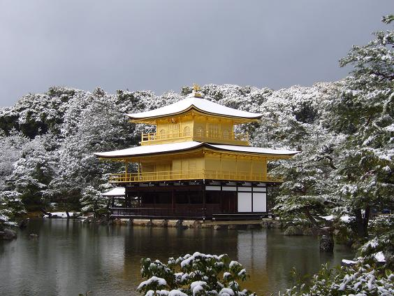 2007年1月7日、雪化粧した鹿苑寺。 投稿者自身が撮影。